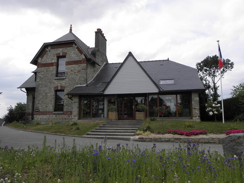 Mairie de Chevaigné (35).